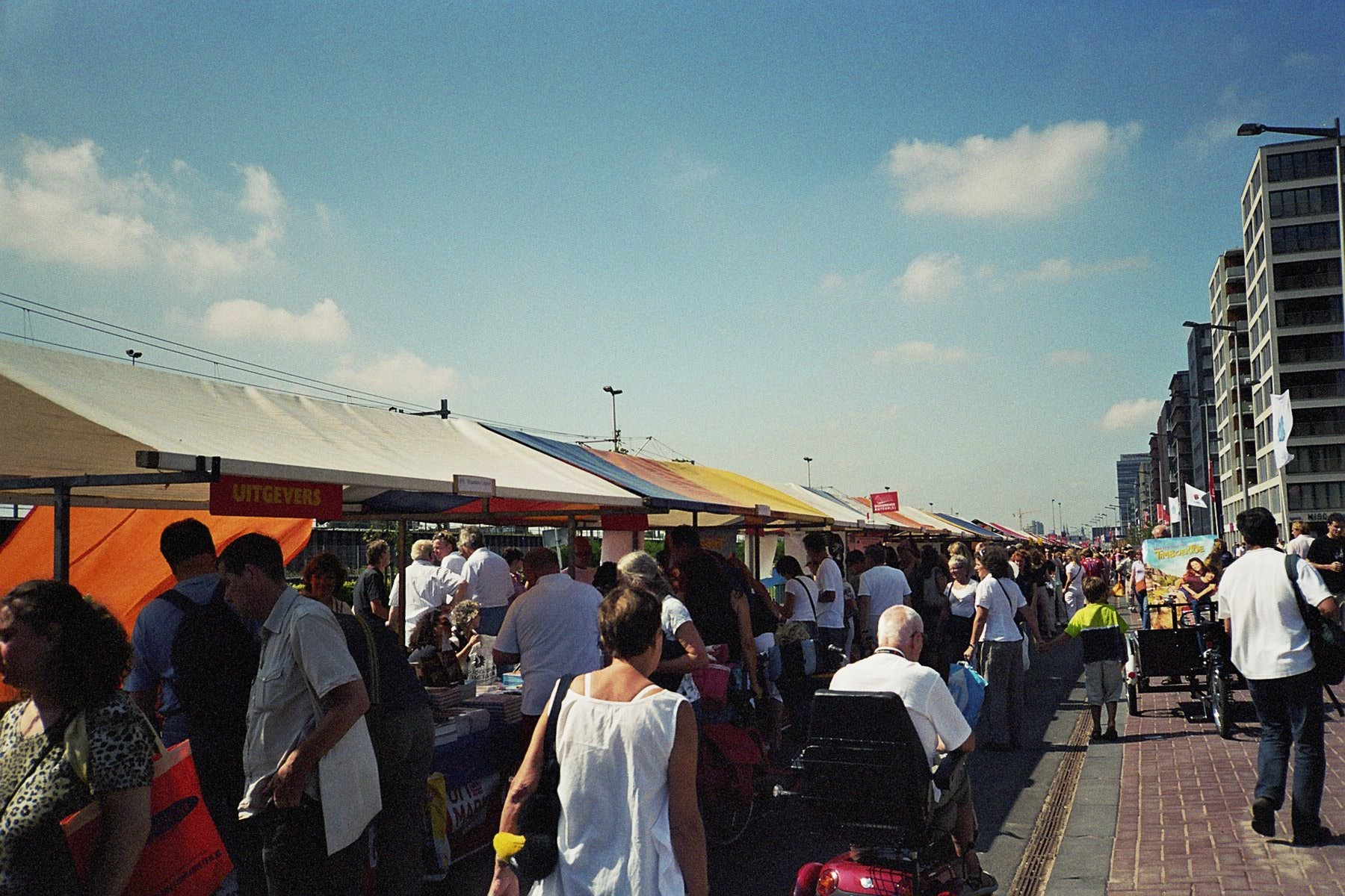 Piet Heinkade, Amsterdam tijdens Uitmarkt 2007